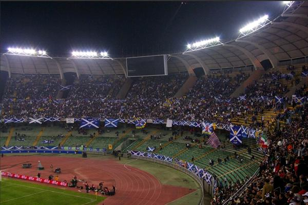 Interno dello Stadio San Nicola. Licensing Immagine tratta dal sito Bari.live. Autorizzazione all'uso concessa, previa citazione della fonte. OTRS #2007062110004343.